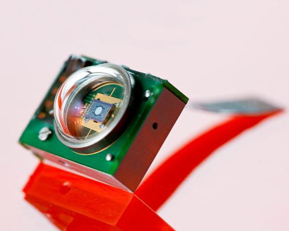 LDC-Modul mit 1D-Mikroscanner und rückseitig integrierter optischer Positionserkennung des Fraunhofer IPMS